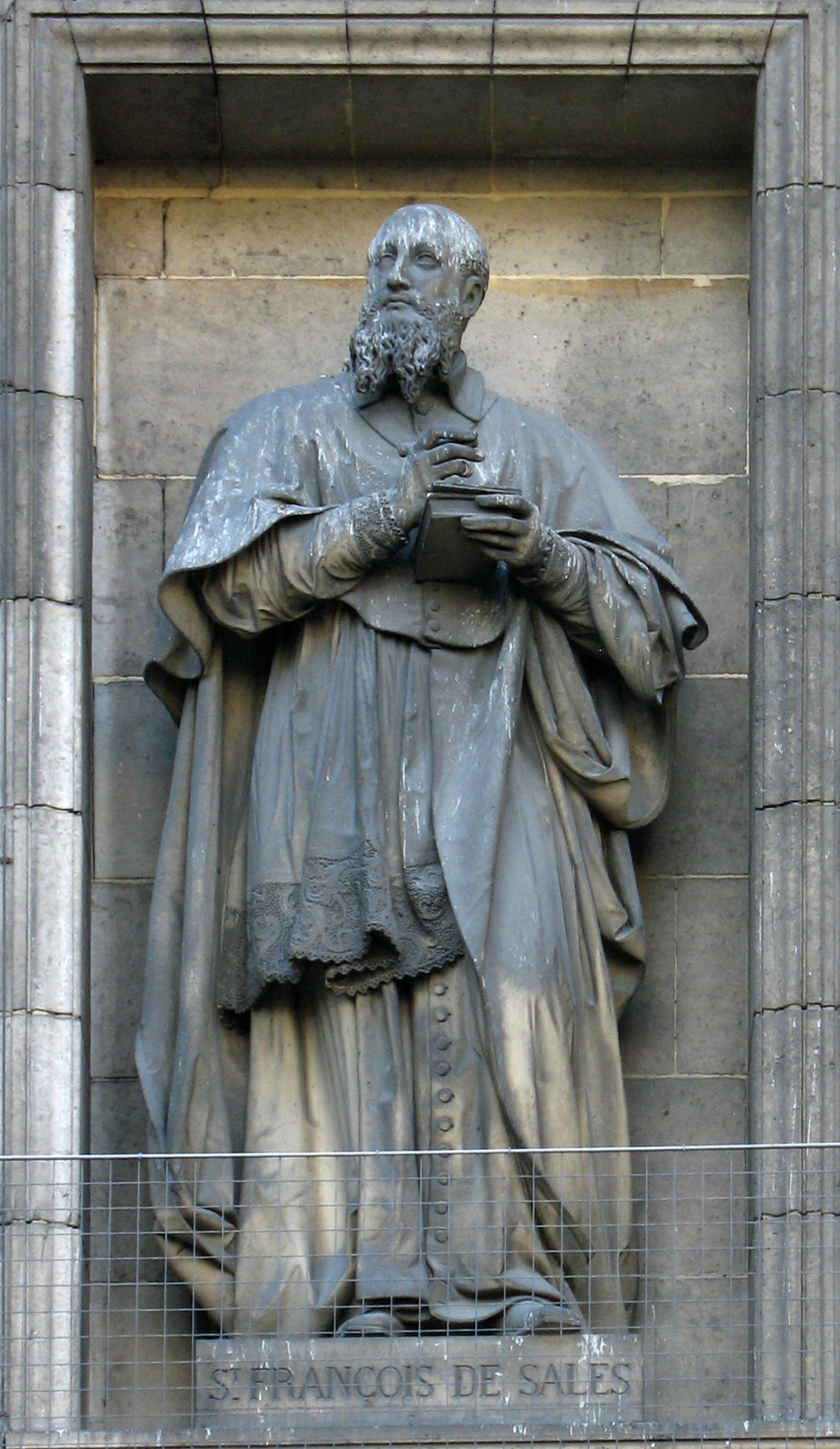 by Johann Dominik Mahlknecht in St. Ulrich in Gröden - Ortisei Prov. Bozen-Bolzano.